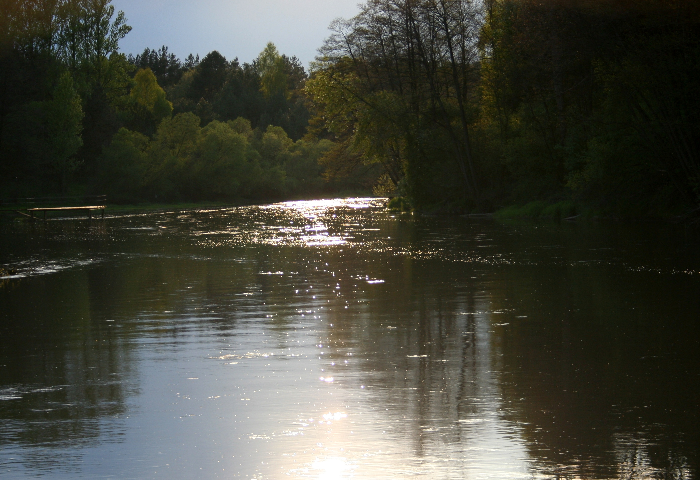 Ujście Liswarty do Warty, widok z "wideł"